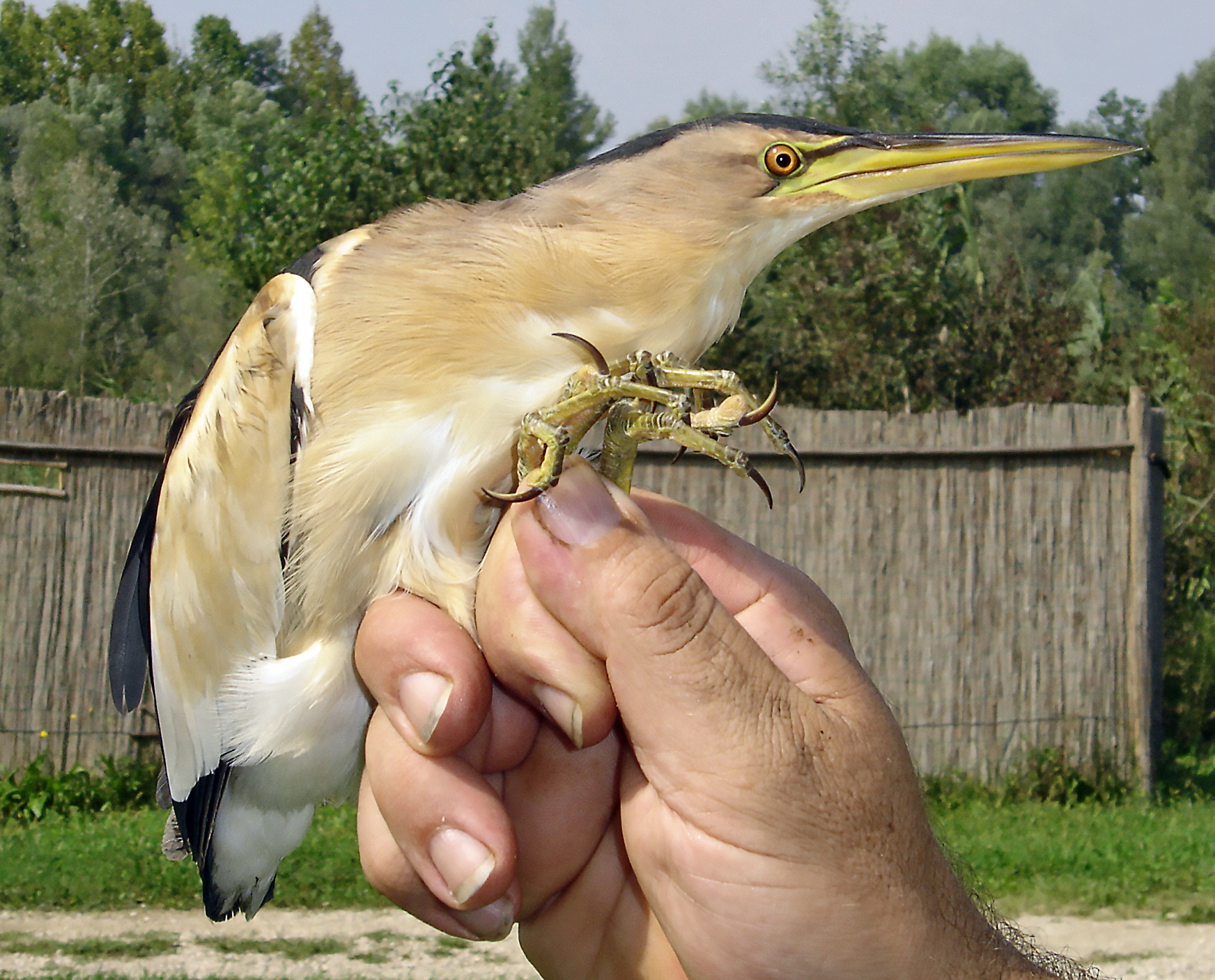 Tarabusino, giovane maschio (Casale)